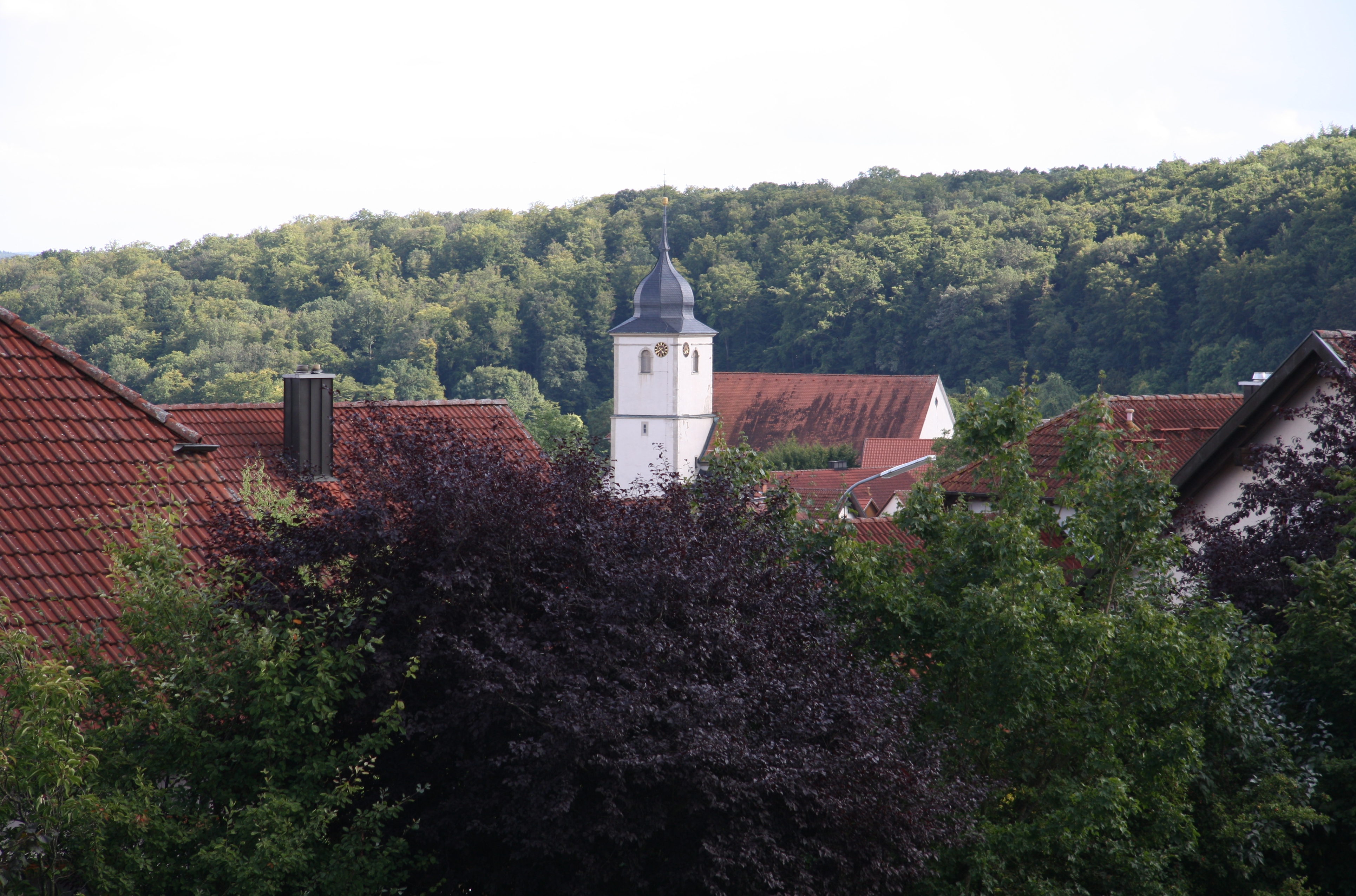 Blick aus etwa nordnordöstlicher Richtung auf die Kirche von Hausen (Rhön).